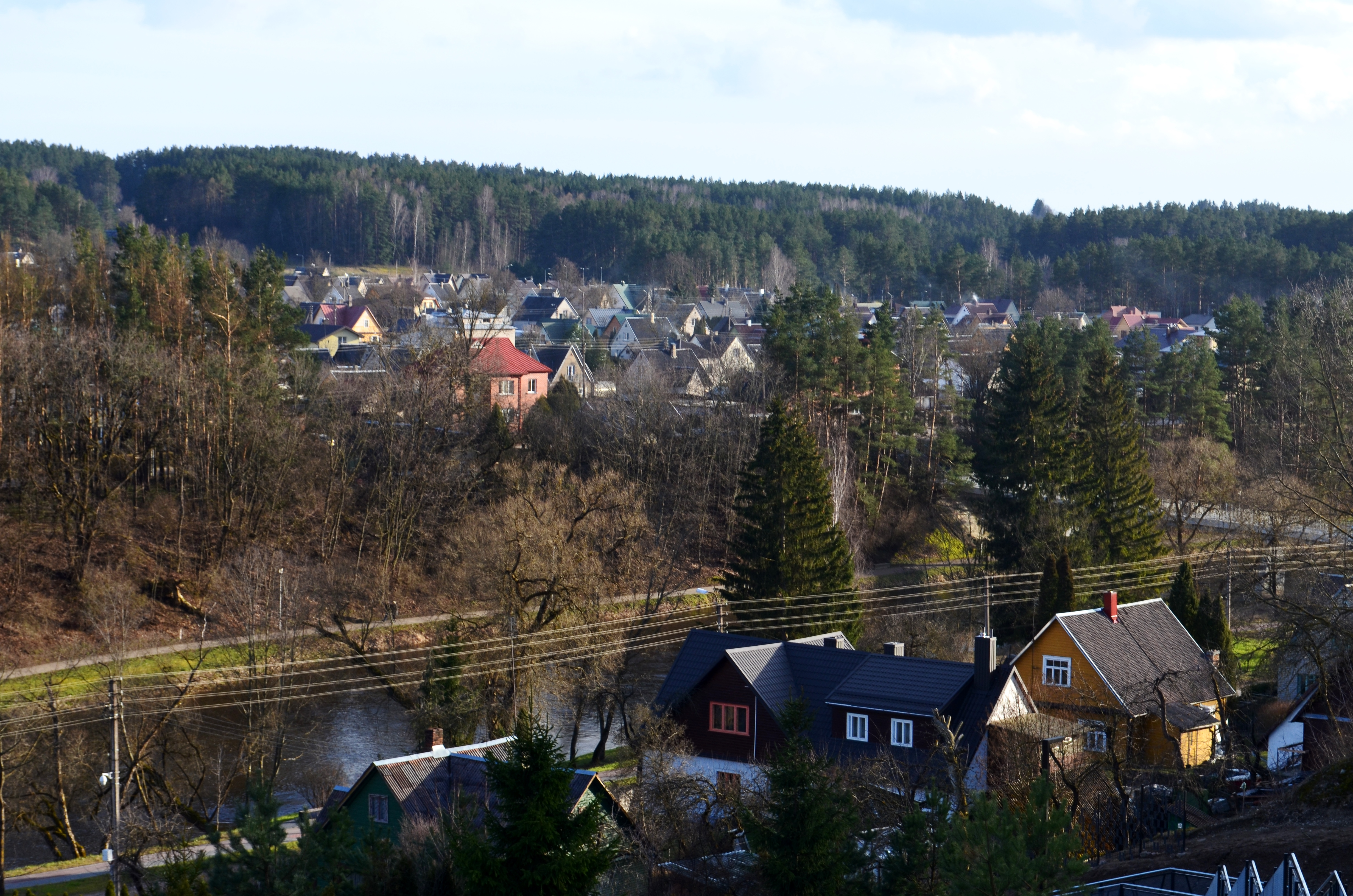 Anykščiai nuo apžvalgos aikštelės